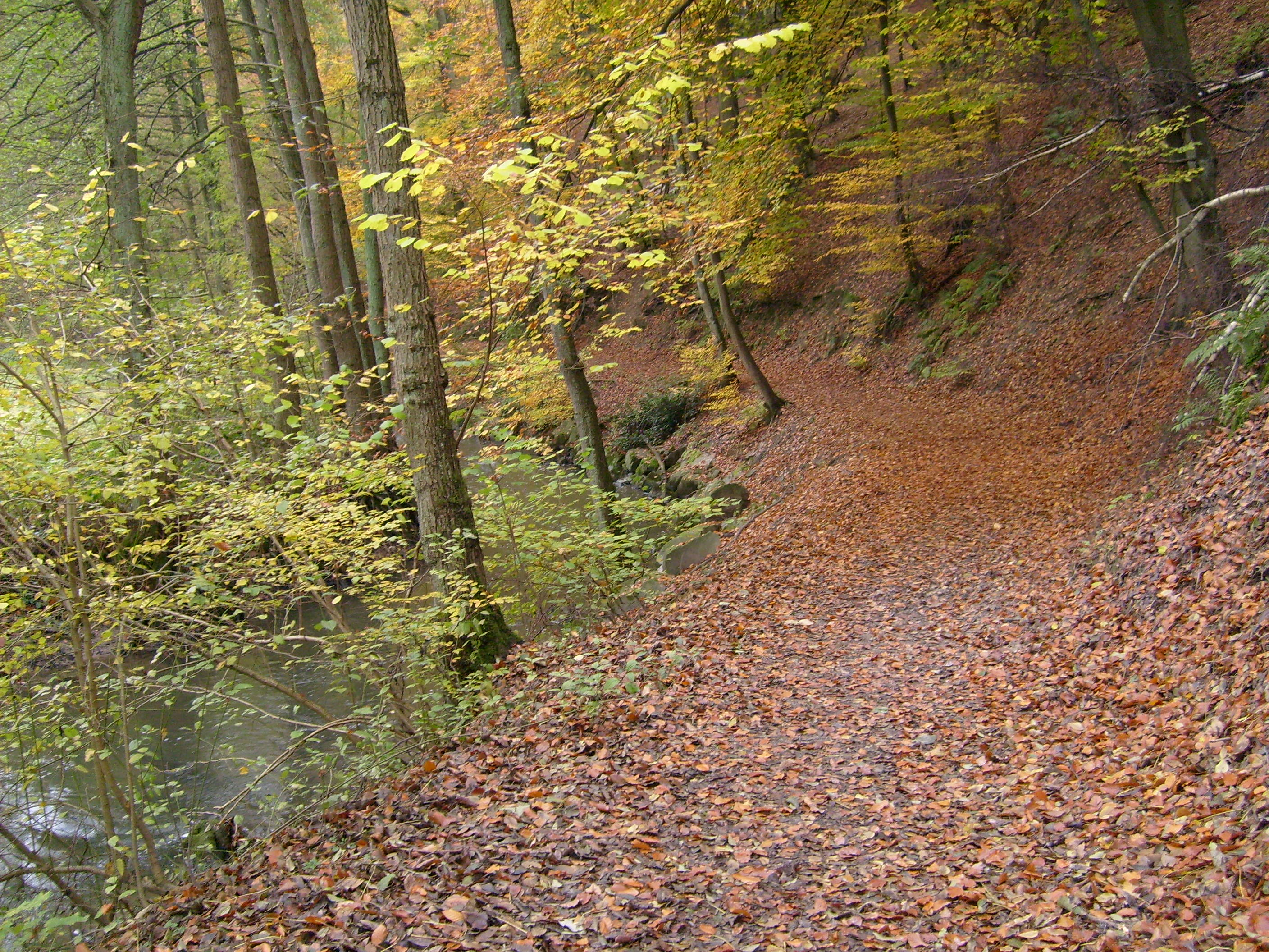 Die Düssel im Naturschutzgebiet „Westliches Neandertal“ in Erkrath (Abschnitt zwischen Feldhofer Kalkofen und Alt-Erkrath)